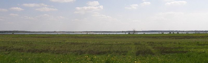 Der Gräbendorfer See